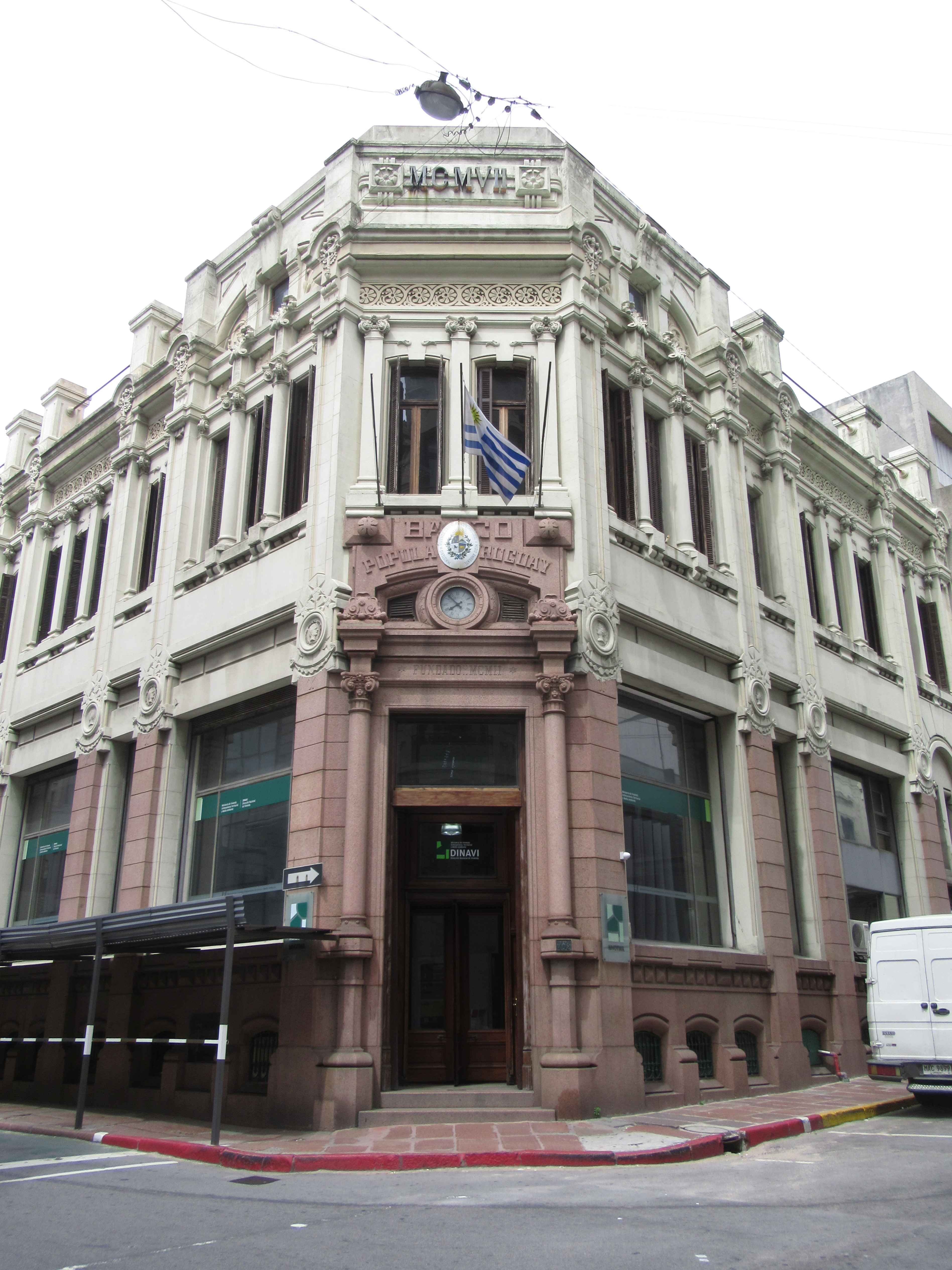 25 de Mayo, 11000 Montevideo, Uruguay. Directora Nacional de Vivienda (DINAVI) - del Ministerio de Vivienda, Ordenamiento Territorial y Medio Ambiente (MVOTMA).